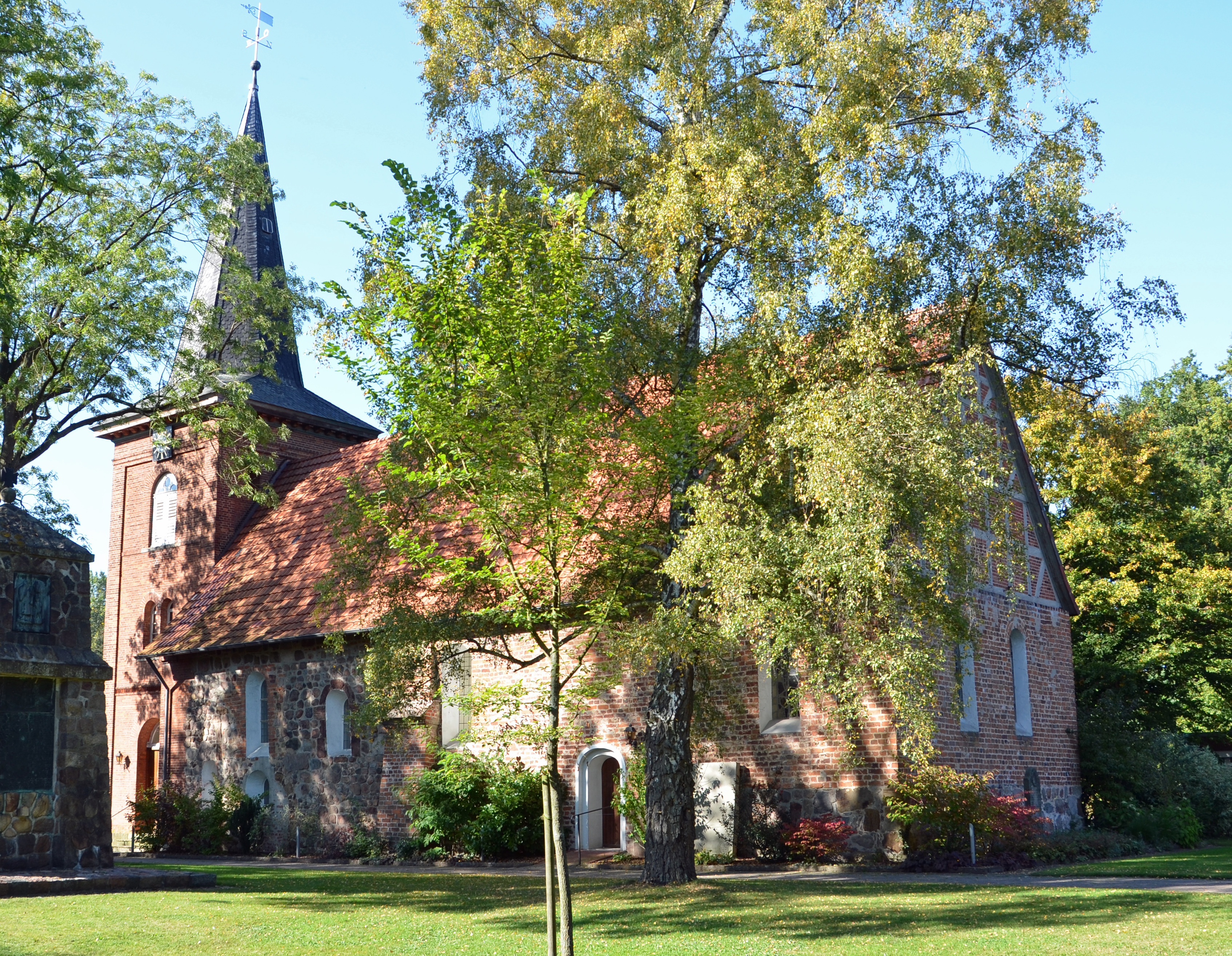 Baudenkmal Bassum Nordwohlde evangelische Kirche